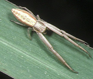 female Runcinia acuminata from Okinawa.